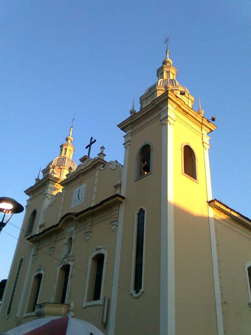 foto da igreja matriz de Taubaté´SP -five o´clock